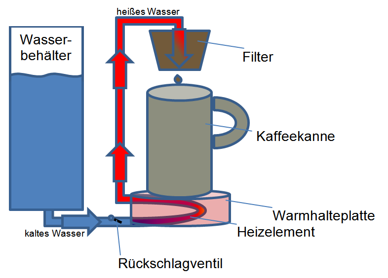 Schematische Darstellung der Funktionsweise einer Kaffeemaschine